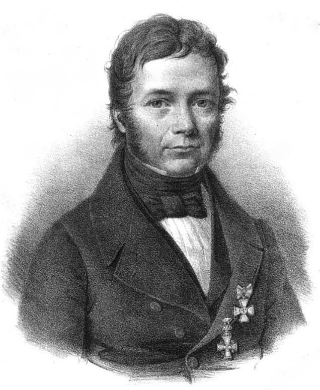 Johannes Voigt (1786–1863), Die Bildunterschrift der Quelle lautet: Dr. Johannes Voigt / Professor der Geschichte und Director des geheim. Archivs zu Königsberg. Ritter des rothen Adler-Ordens 3. Cl.m d Schl. u des Danebrog-Ordens